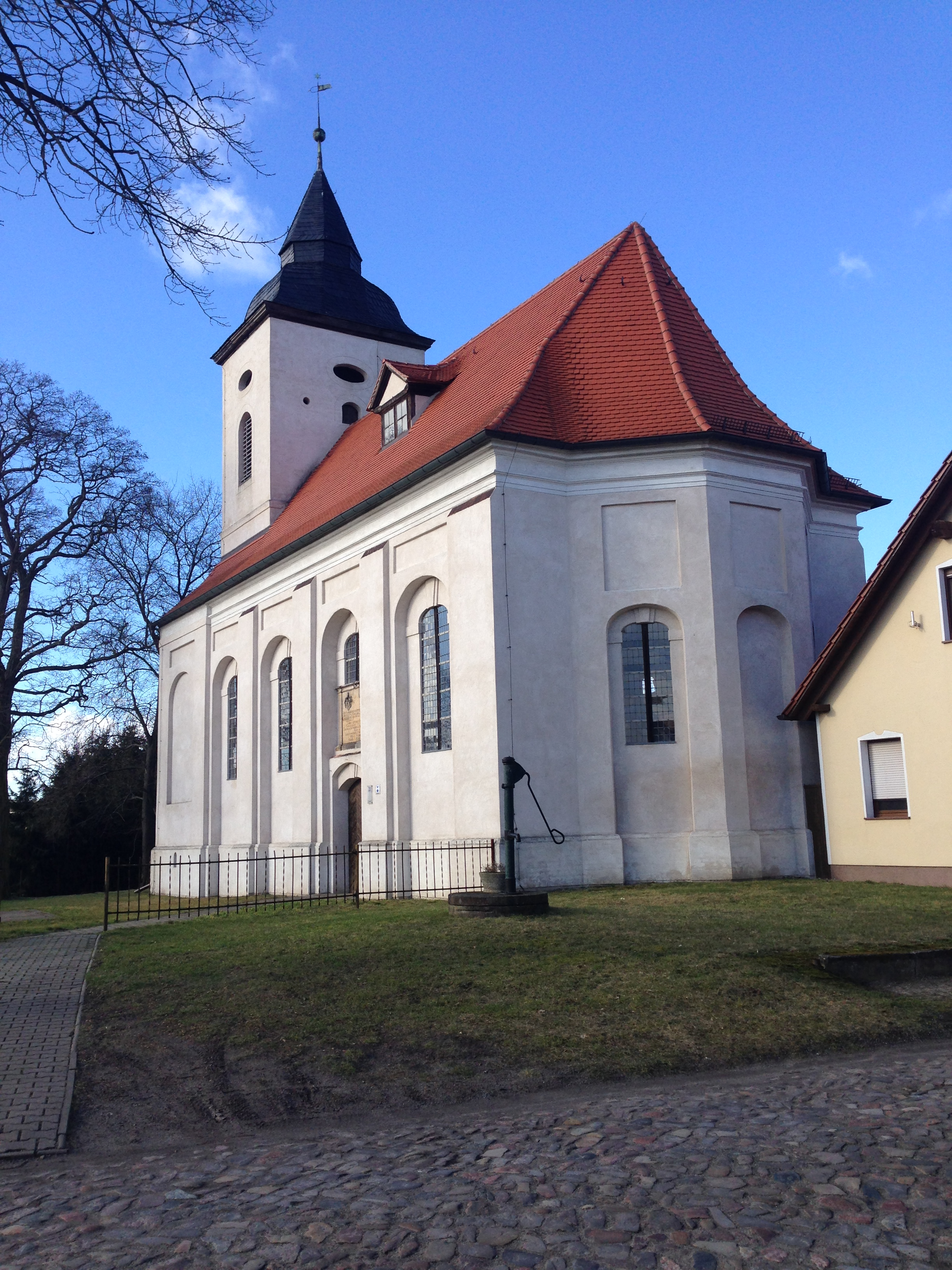 Dorfkirche Altenklitsche, Ostansicht, Februar 2014